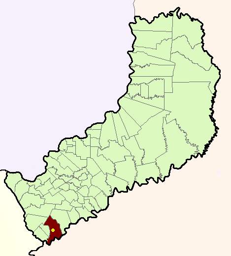 A map of Concepción de la Sierra's municipio in Misiones province, Argentina. The big point is Concepción de la Sierra town, the little one is Barra Concepción town.